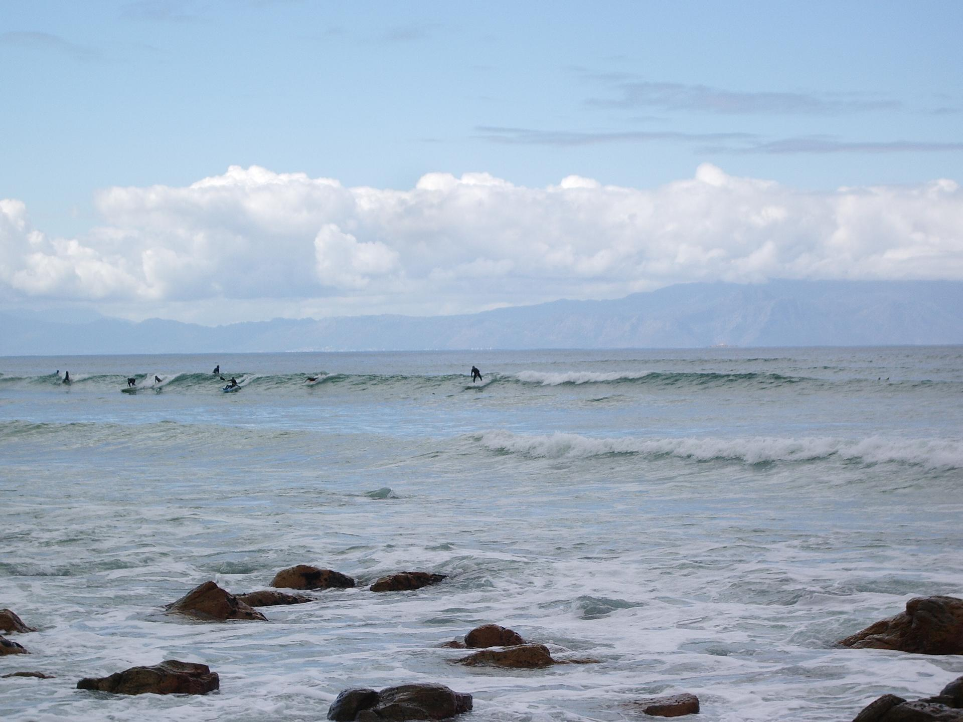 falsebay